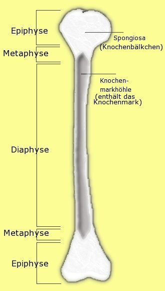 Selbstgemalte Darstellung eines grossen Roehrenknochens am Beispiel des Oberarmknochens (Humerus) zur Veranschaulichung von Epi- und Diaphyse.